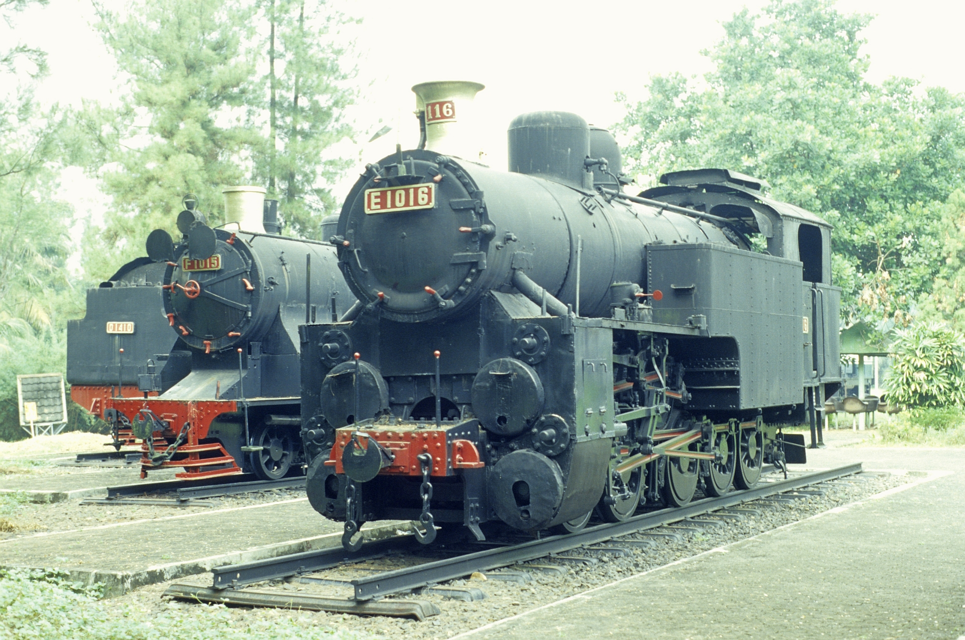 DKA E10 (10 16 B)